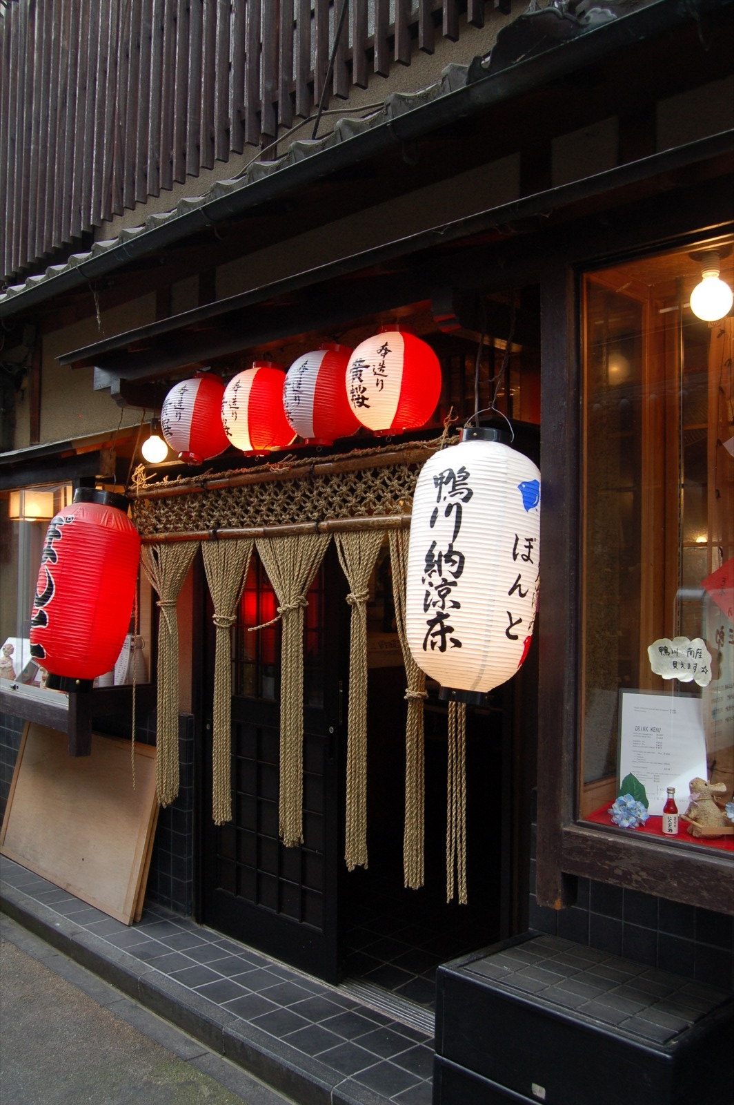 Taken at 17:29 (JST)